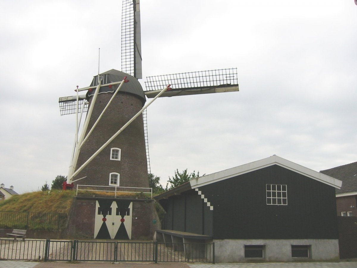 Molen van Verbeek/ Ten-Bruggencatenummer: 02788: Ronde stenen beltmolen schuin van achteren gefotografeerd (opmerking: Foto gemaakt in het kader van het project Actualisering Monumentenregister (AMR).)